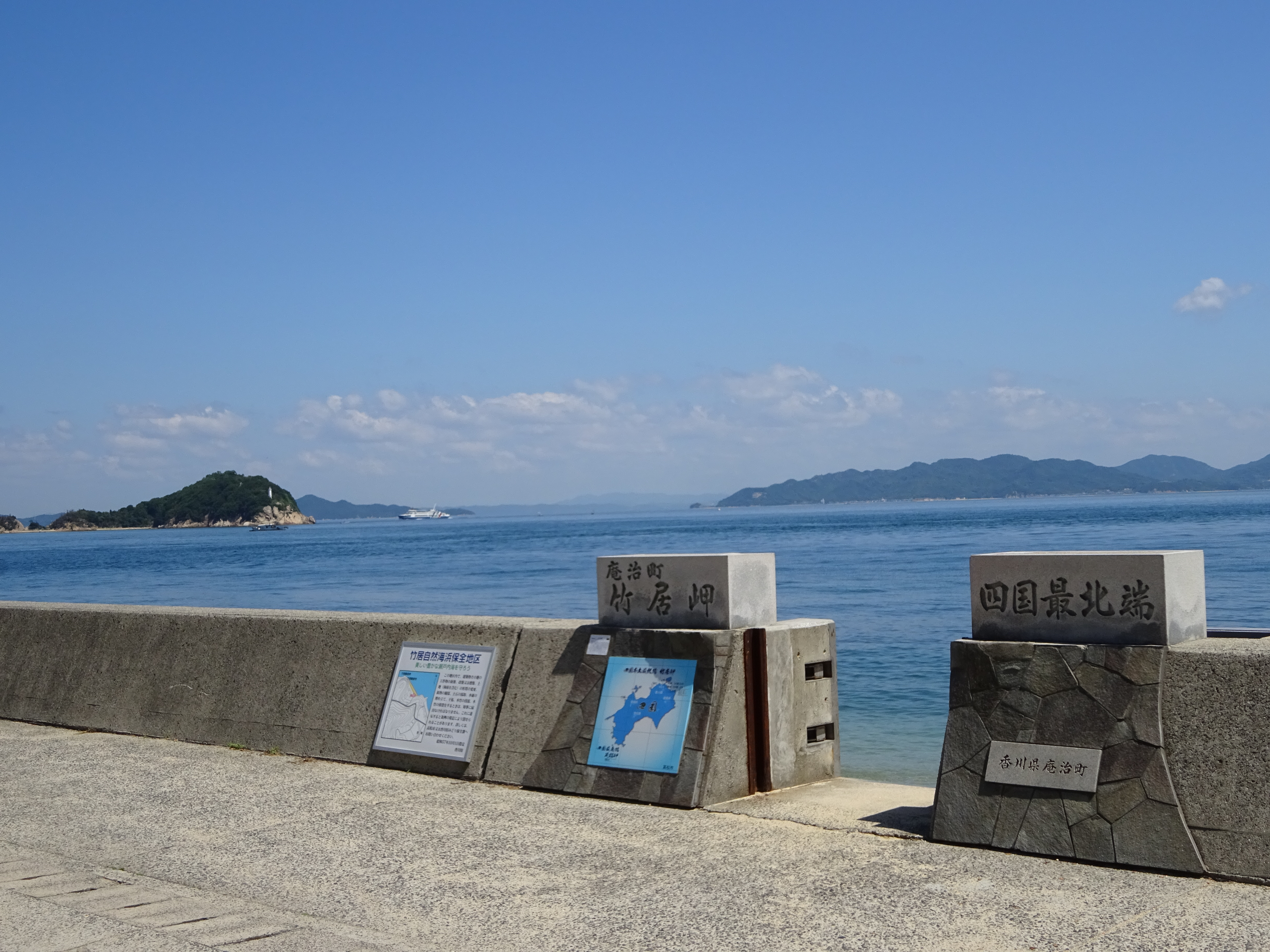 四国本土最北端・竹居岬、表示板と瀬戸内海（六月）、高松市